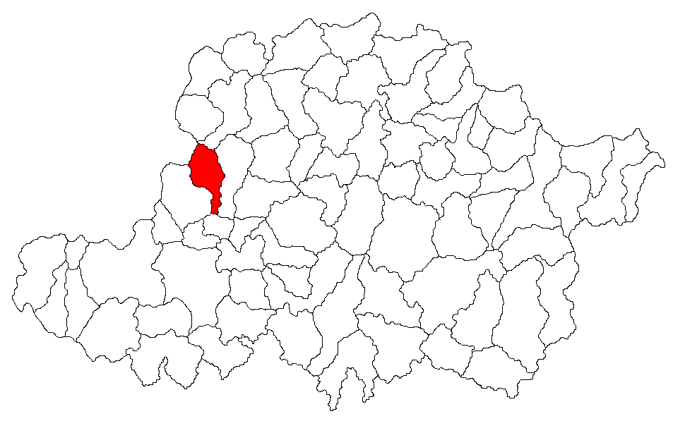 Categorie:Hărţi ale judeţului Arad